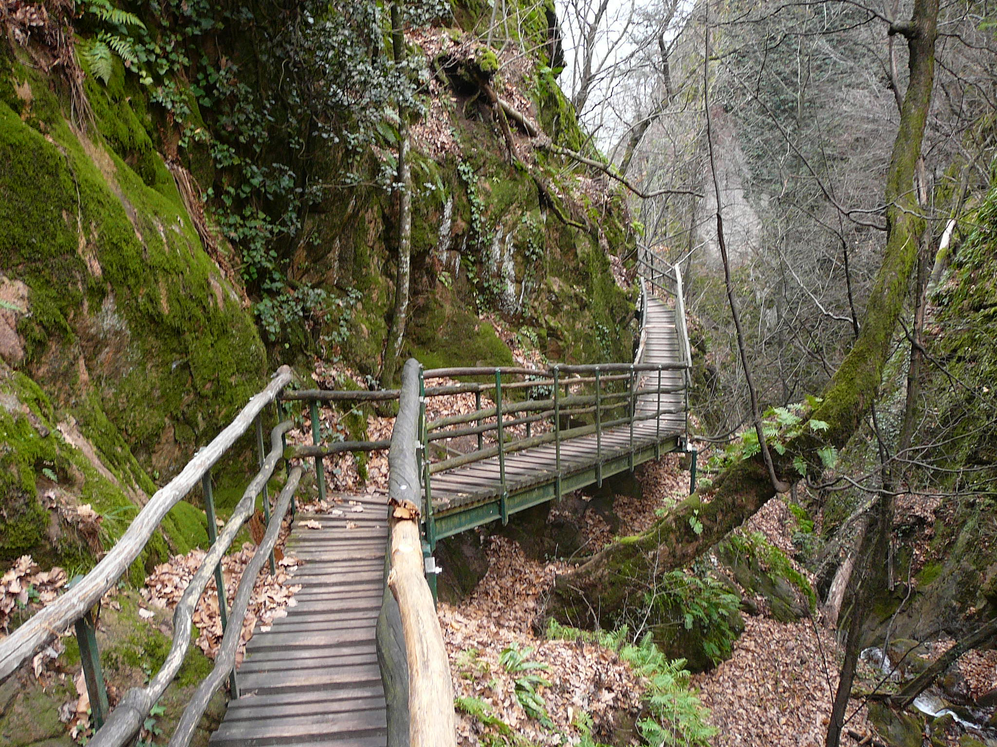 passerella al rastenbachklamm